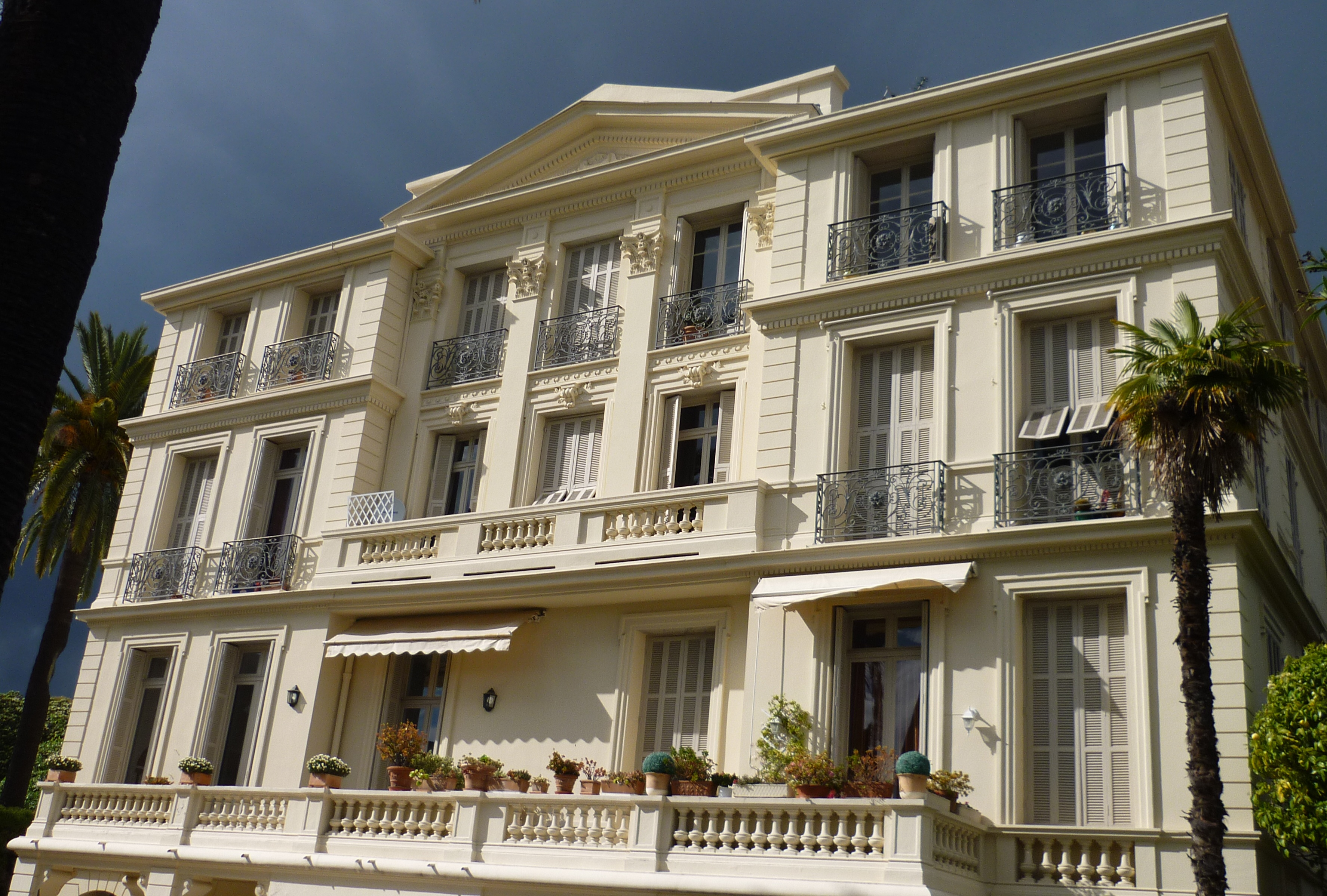 Villa Nobili, ancien "Château de Cimiez", construite en 1894 au quartier de Cimiez à Nice